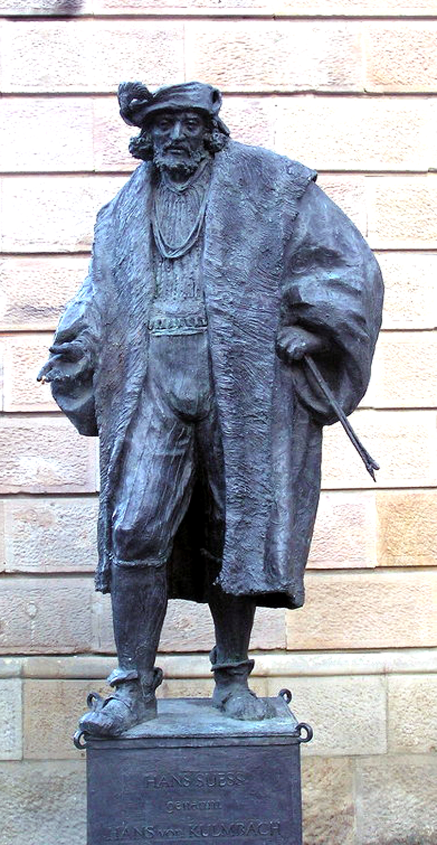 Descrption: Hans Süß von Kulmbach, Denkmal vor dem Rathaus in Kulmbach Source: fotografiert am 20.Dezember 2004 Author: Schubbay